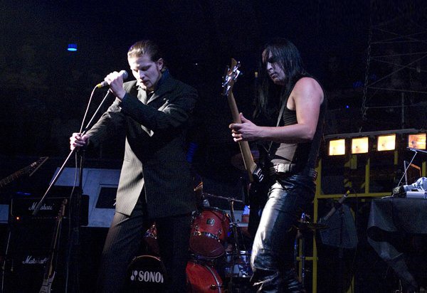 Группа Infestum на Metalfront fest в 2008г (« : 3 года вместе!»).